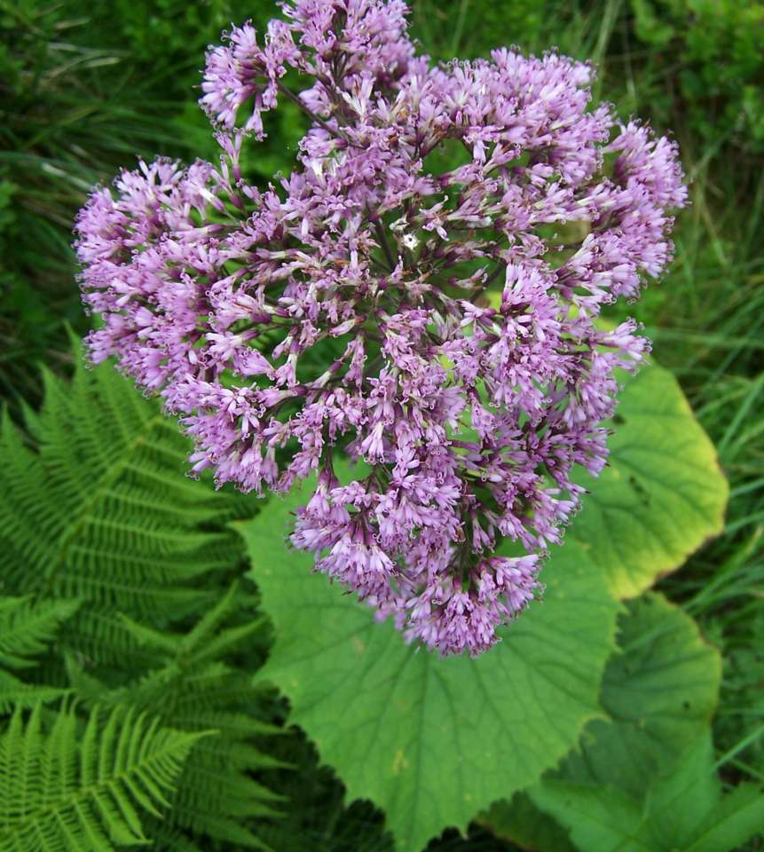 Adenostyles alliariae (pl. miłosna górska)